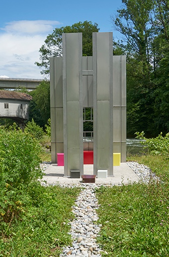 Vom Fotografen frei gegebene Abbildung einer Skulptur von Ursula Hirsch (Zustimmung des Fotografen schriftlich vorhanden)